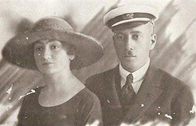 Cécile Czapska et Nicolas Dolgorouky en 1919.